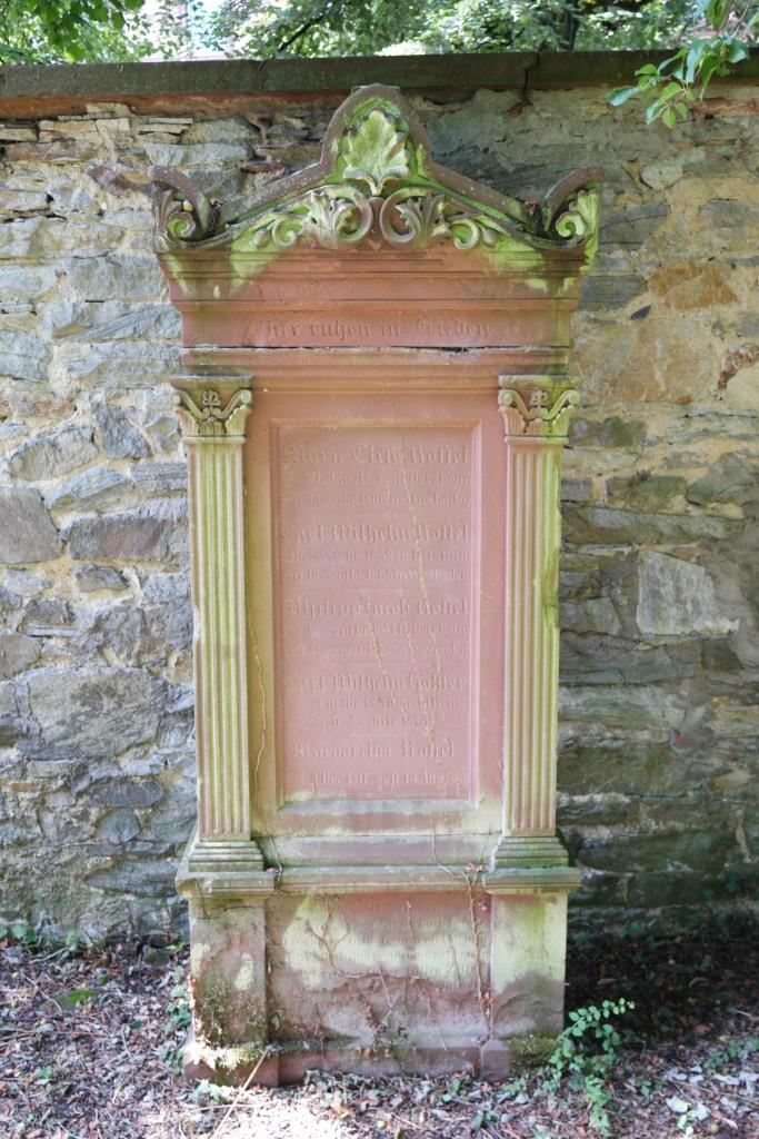 Grab des Historikers, Lehrers und Kommunalpolitikers Karl Rossel, 1815-1872, auf dem Alten Friedhof in Wiesbaden